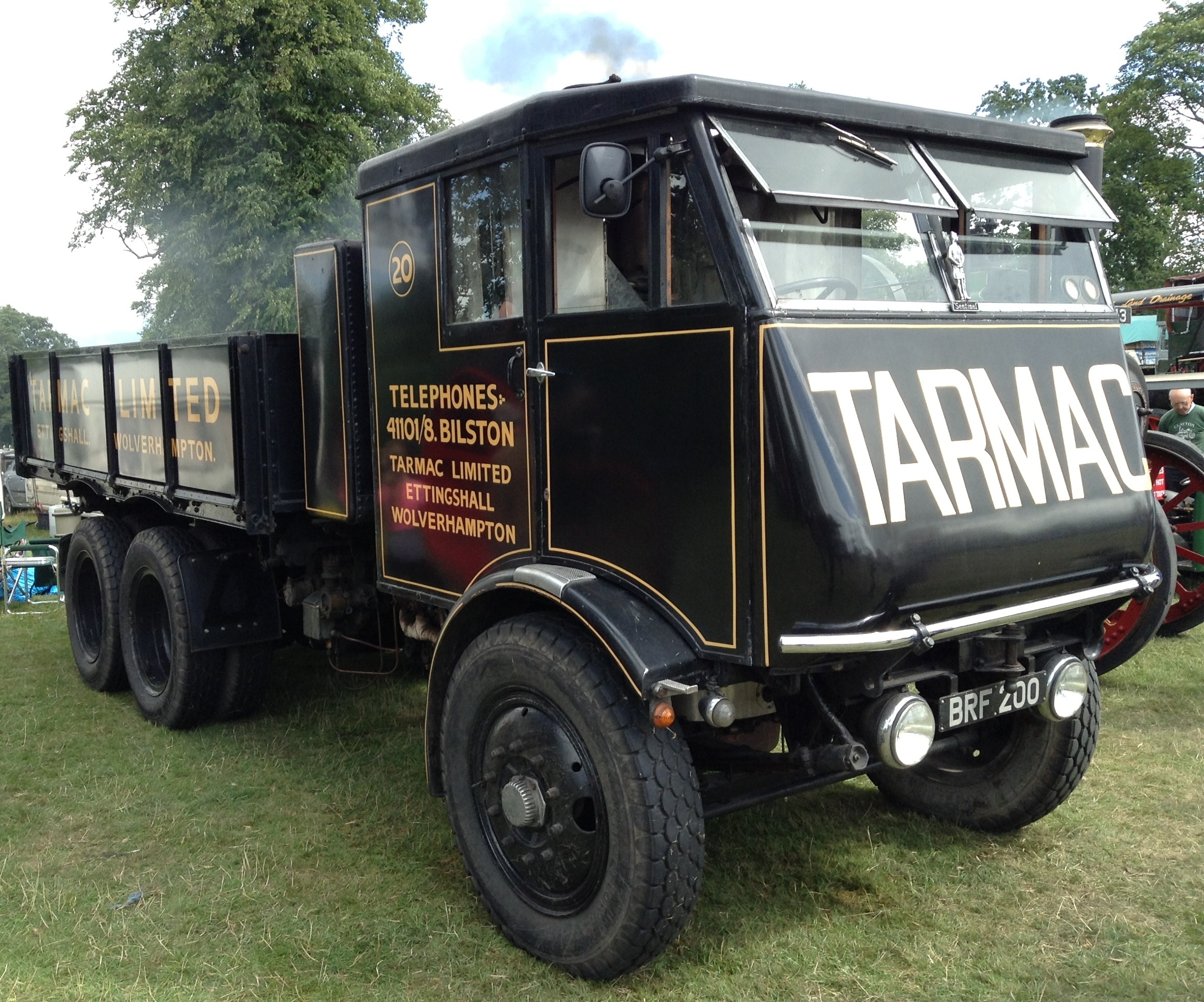 Sentinel steam lorry